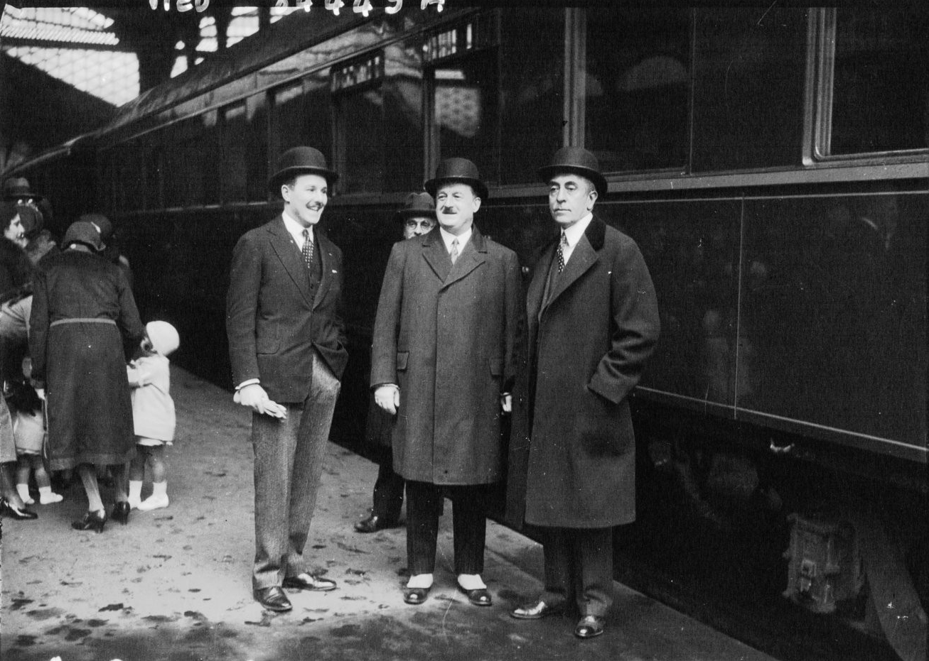 Gare Saint-Lazare - de gauche à droite - Charles de Breteuil, Vatin-Pérignon, C. Bascom Slemp